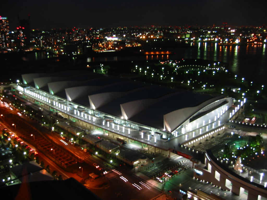 横浜国際平和会議場 展示ホールの夜景